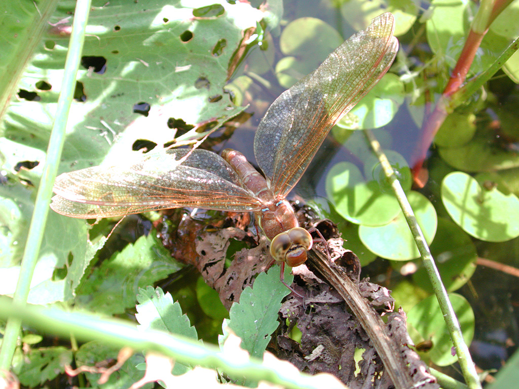 Aeshna grandis, f., oviposting, Braune Mosaikjungfer bei der Eiablage, NSG Kirchwerder Wiesen, Elbmarsch bei Hamburg, Germany